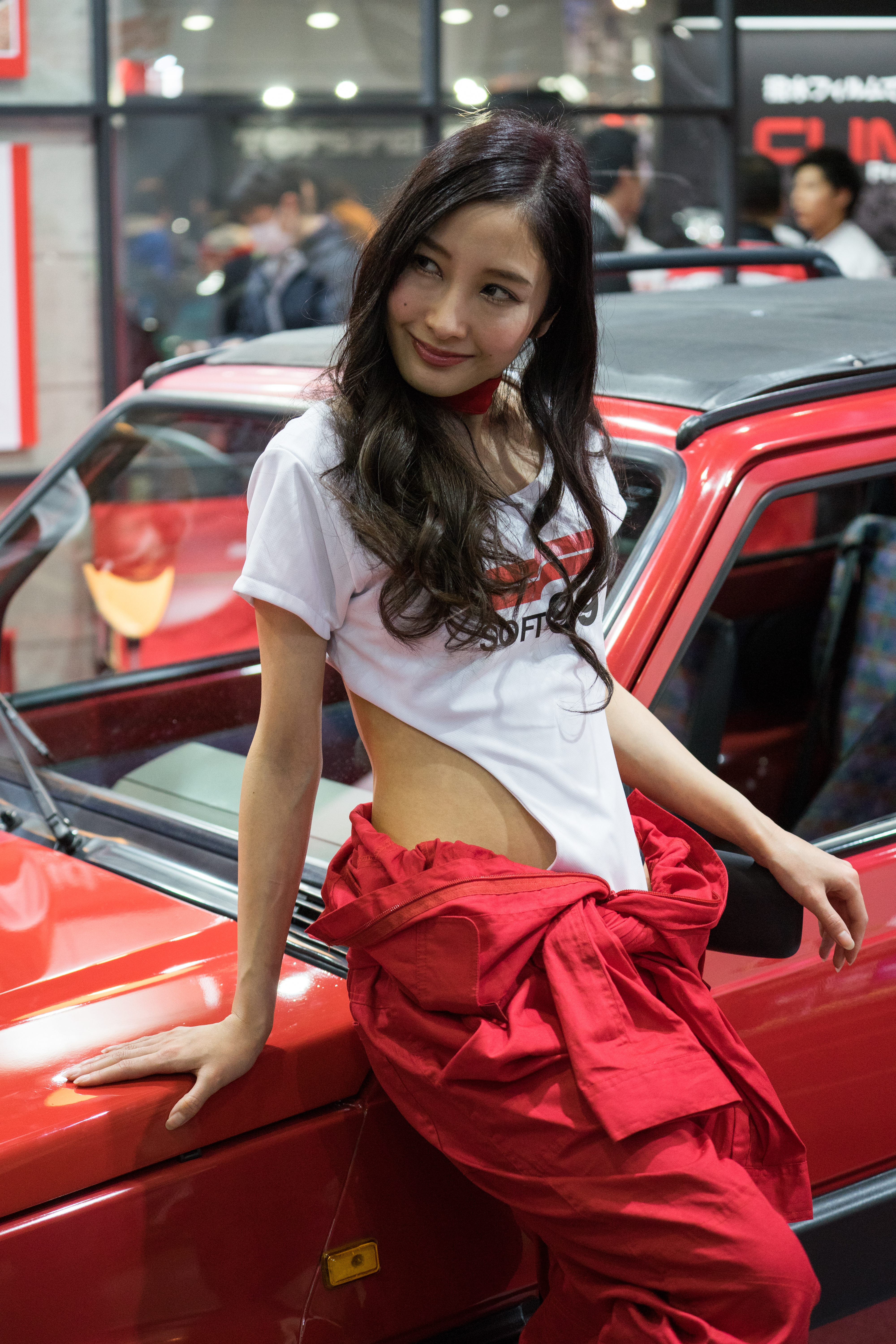 TOKYO AUTO SALON 2017 （東京オートサロン2017）-134.jpg